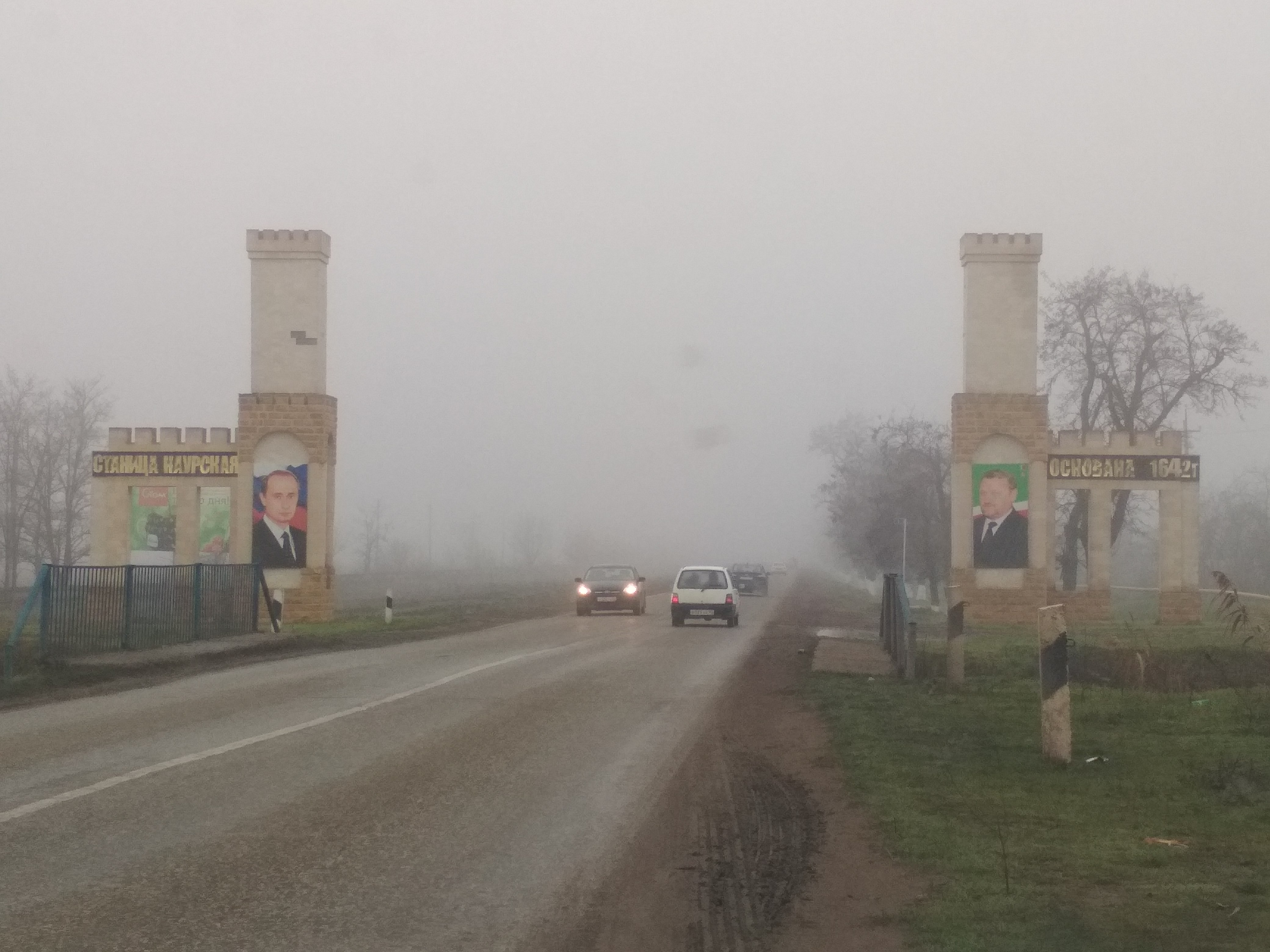 Нохчийн: Новр-ГӀалан кевнаш